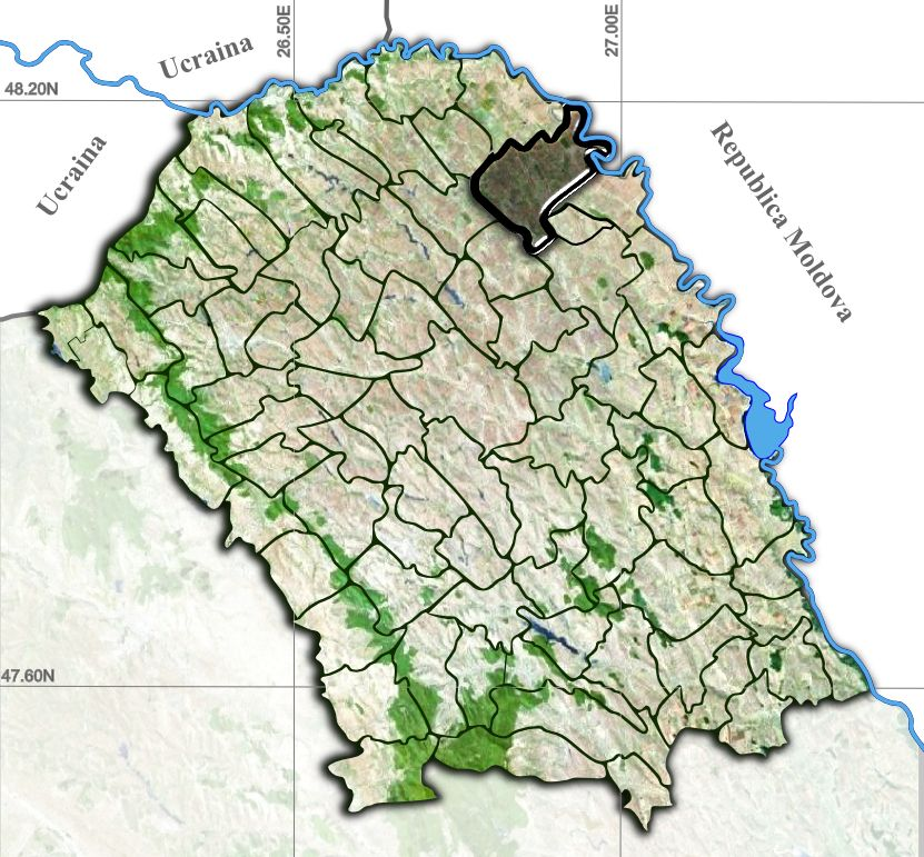 Cotusca jud Botosani.